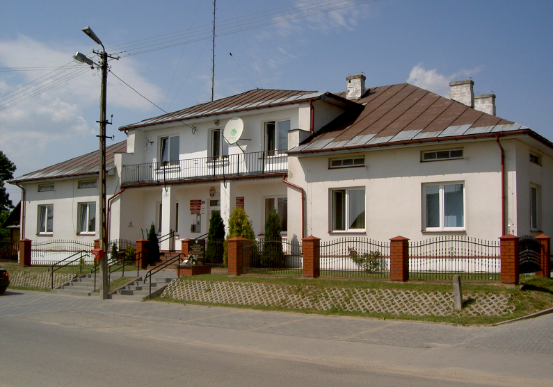 Obsza, Poland • Urząd Gminy / Commune Council